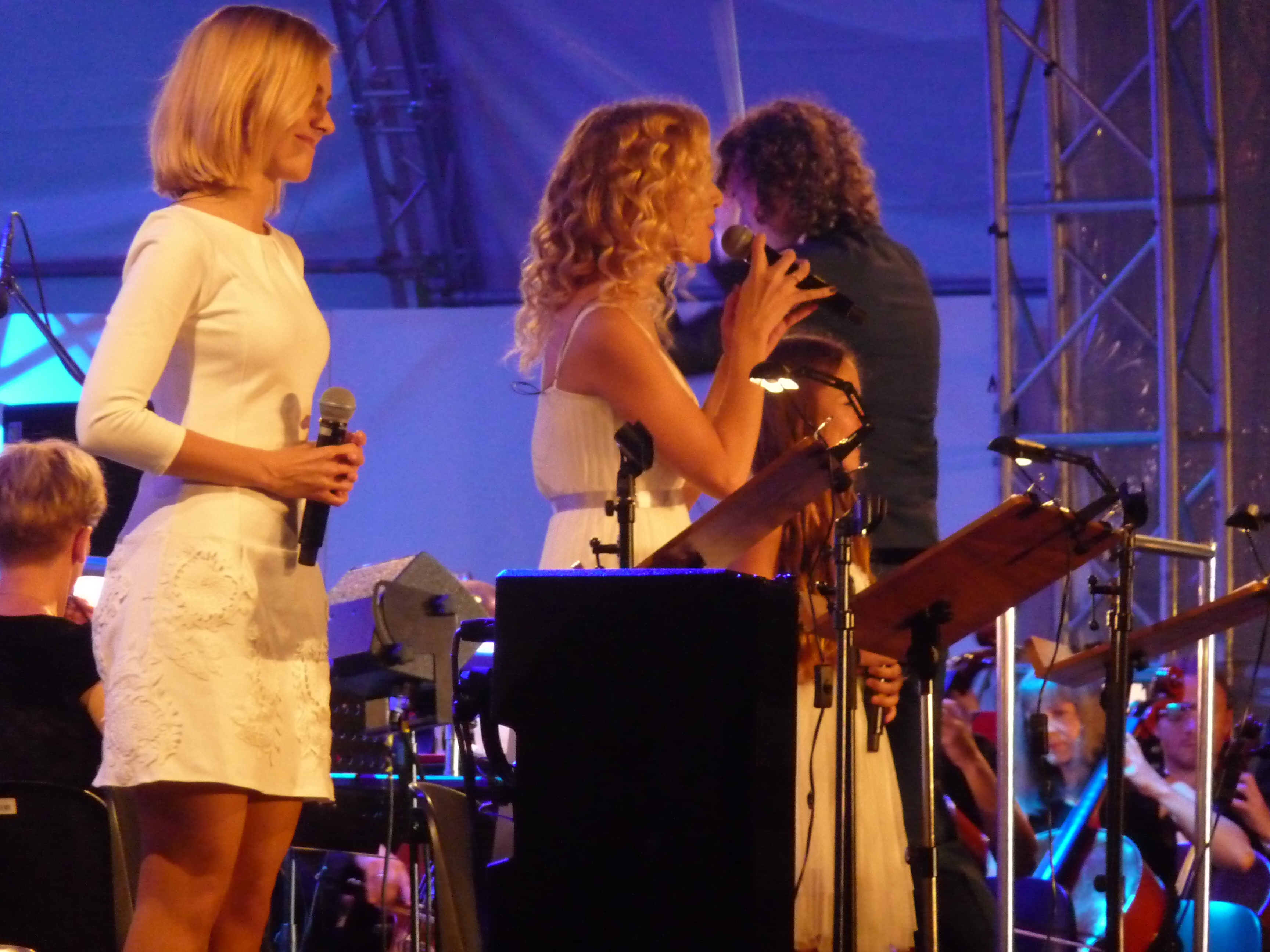 Zofia Nowakowska, Agnieszka Przekupień i Olivia Wieczorek, Piot Rubik Z powodu Mojego imienia (koncert w Krakowie)